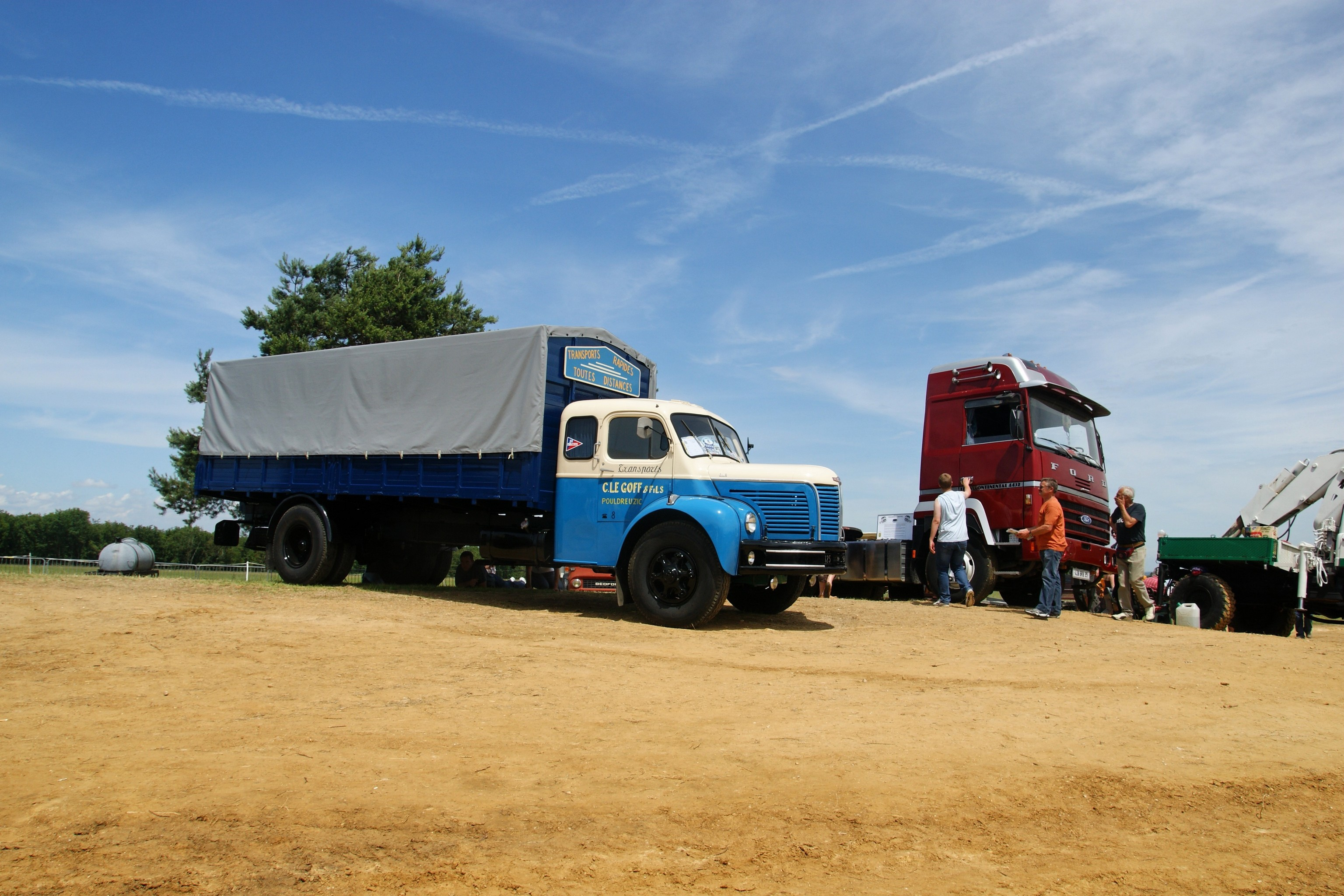 Les camions à La Locomotion en Fêtes